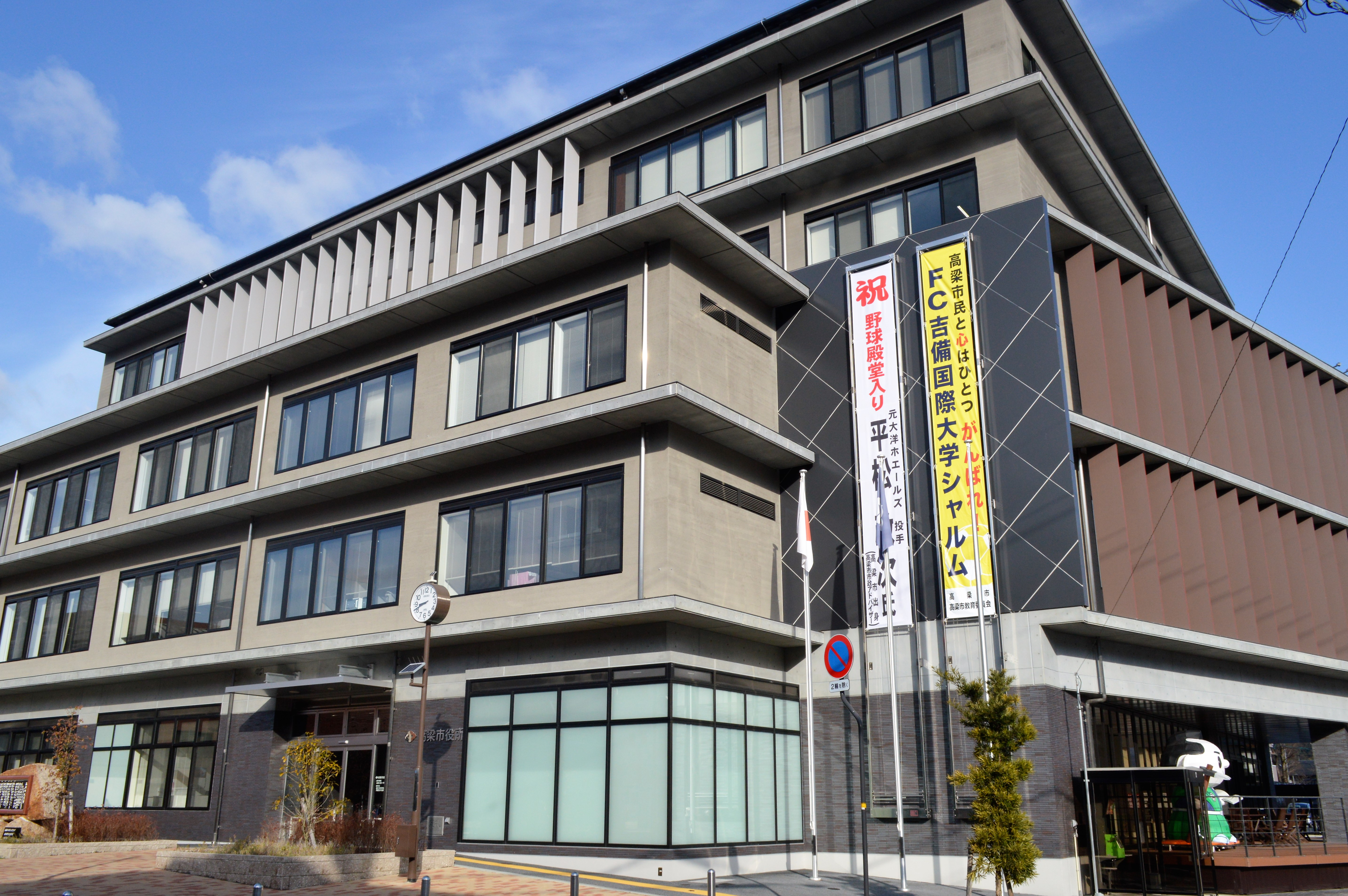 高梁市役所。